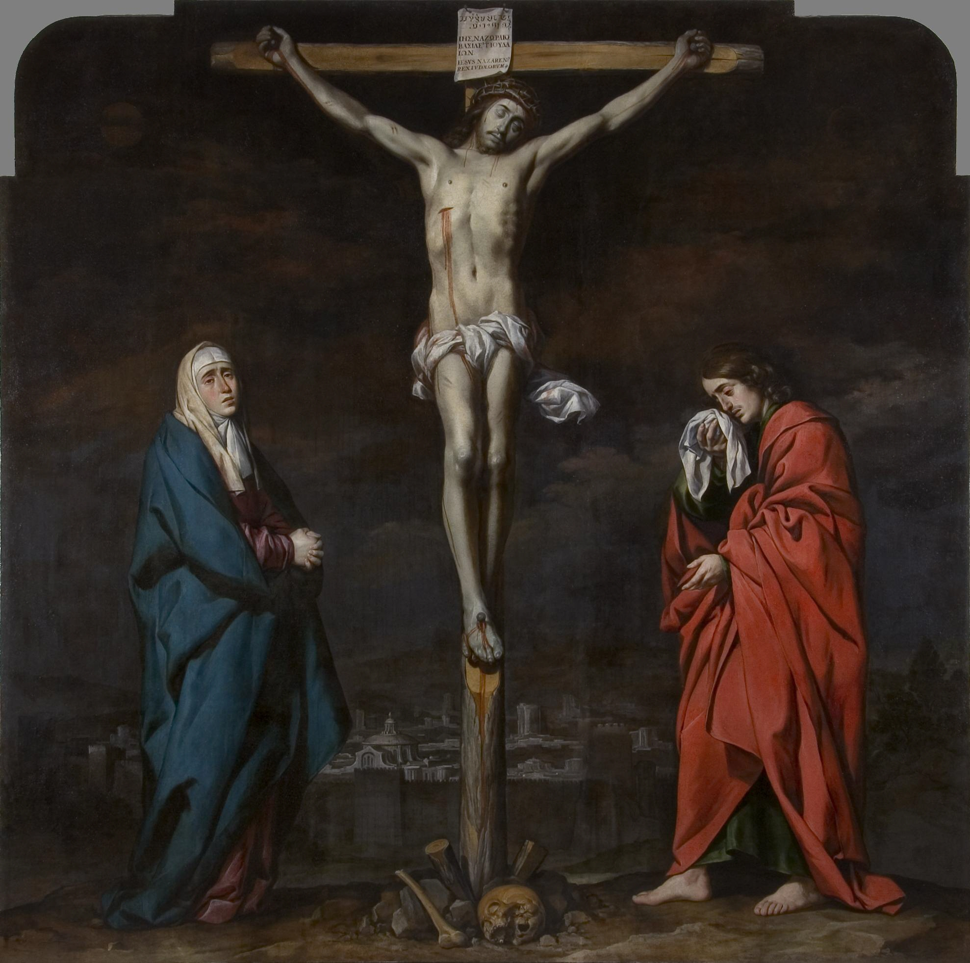 La obra muestra a Jesucristo crucificado en el Monte Calvario y acompañado por su madre, la Virgen María, y por San Juan.